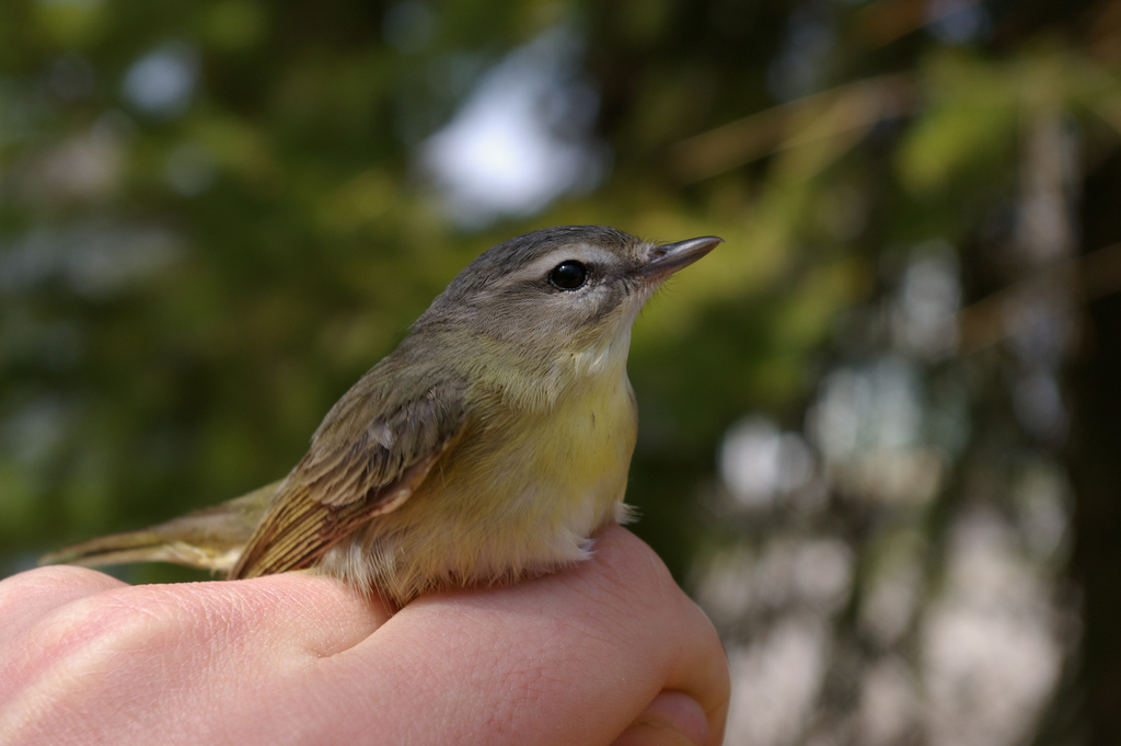 Kanadanvireo.